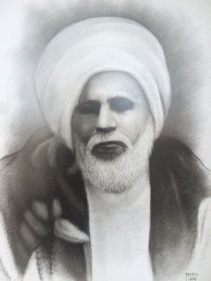 Al-'Alim Al-'Allamah Asy-Syaikh Muhammad Kholil bin Abdul Lathif Al-Bangkalani Al-Maduri Al-Jawi Asy-Syafi'i